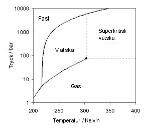 Tryck-temperatur-fasdiagram för koldioxid. Gjord för att visa fenomenet superkritisk vätska. Phase diagram of carbon dioxide. Temperature on x-axis, Pressure on Y-axis (logaritmic).